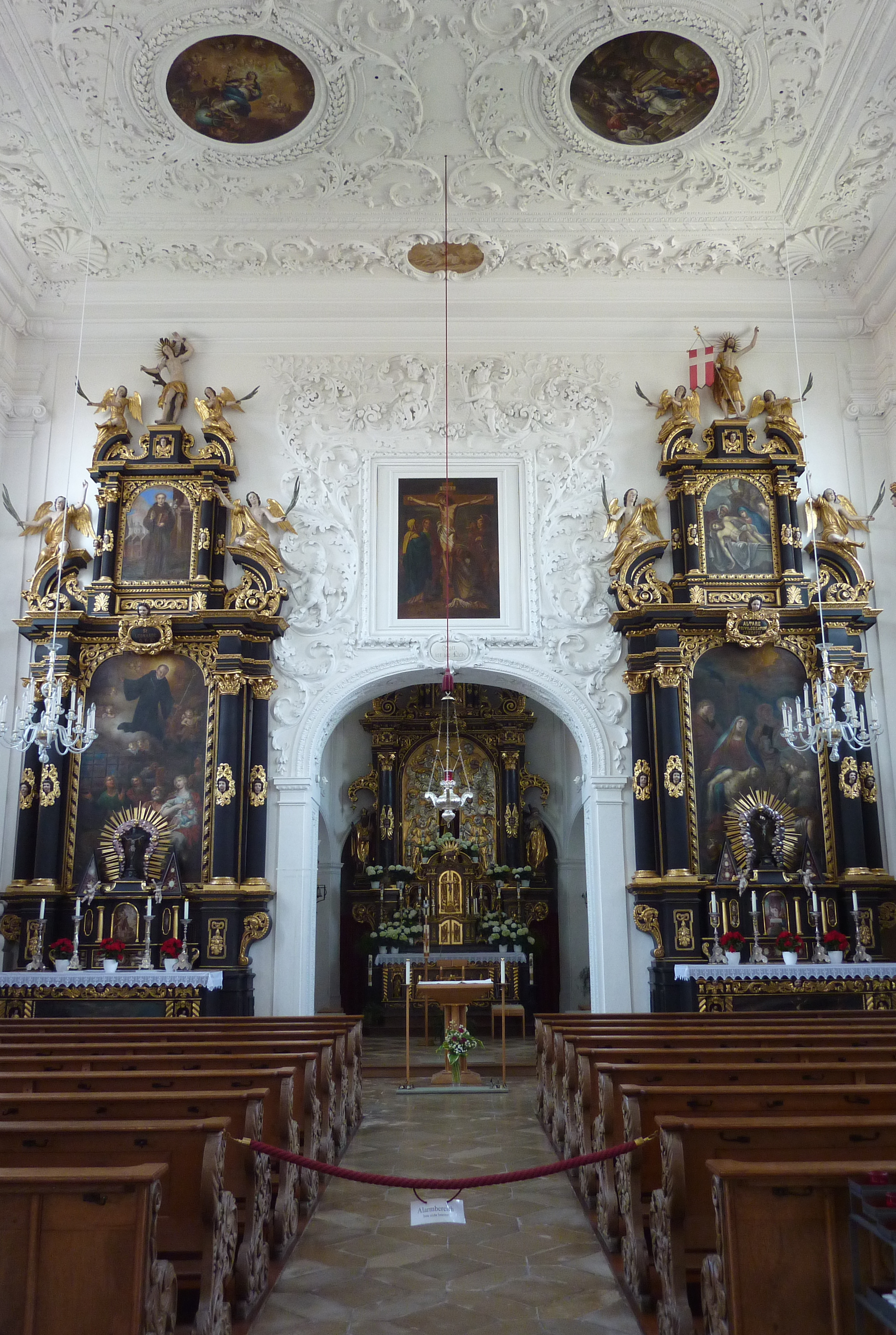 Katholische Wallfahrtskirche Unsere Liebe Frau in Münsterhausen im Landkreis Günzburg (Bayern), Innenraum mit Blick zum Chor